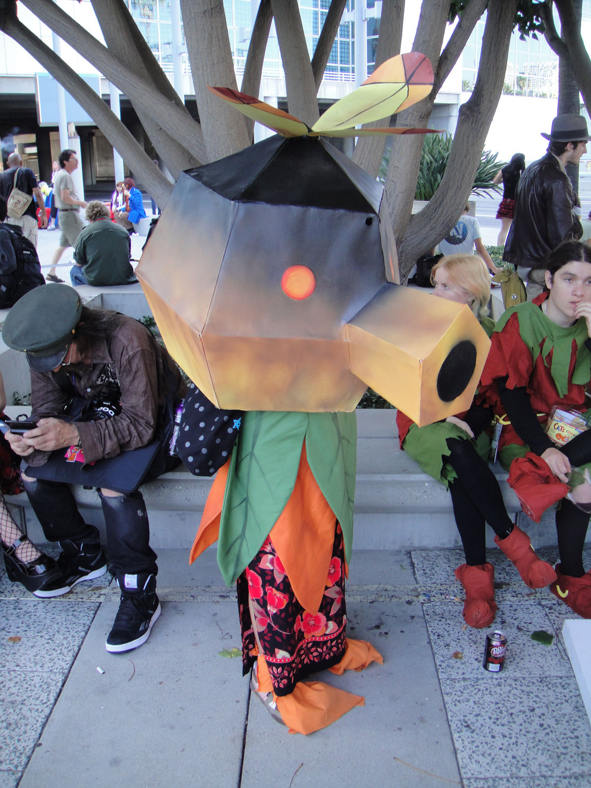 Anime Expo 2010 - LA